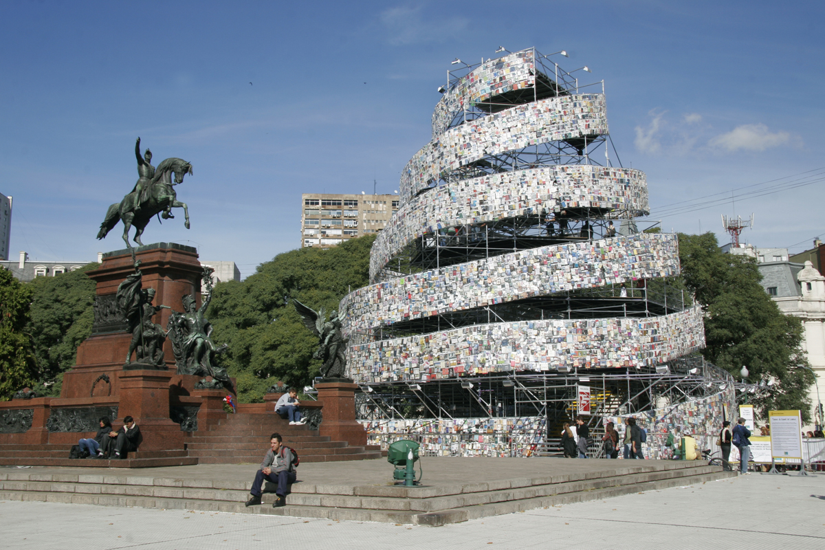 ( Foto: Estrella Herrera)